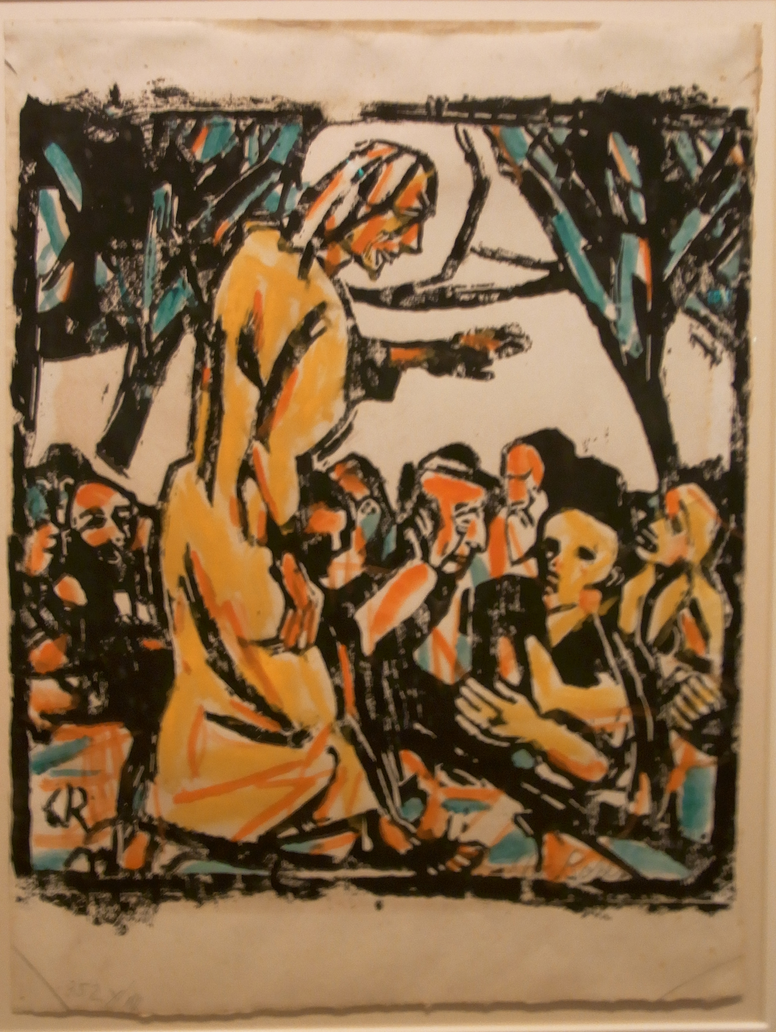 Bergpredigt